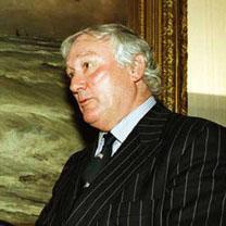 Jan Gmelich Meijling. Staatssecretaris van Defensie (1994-1998)